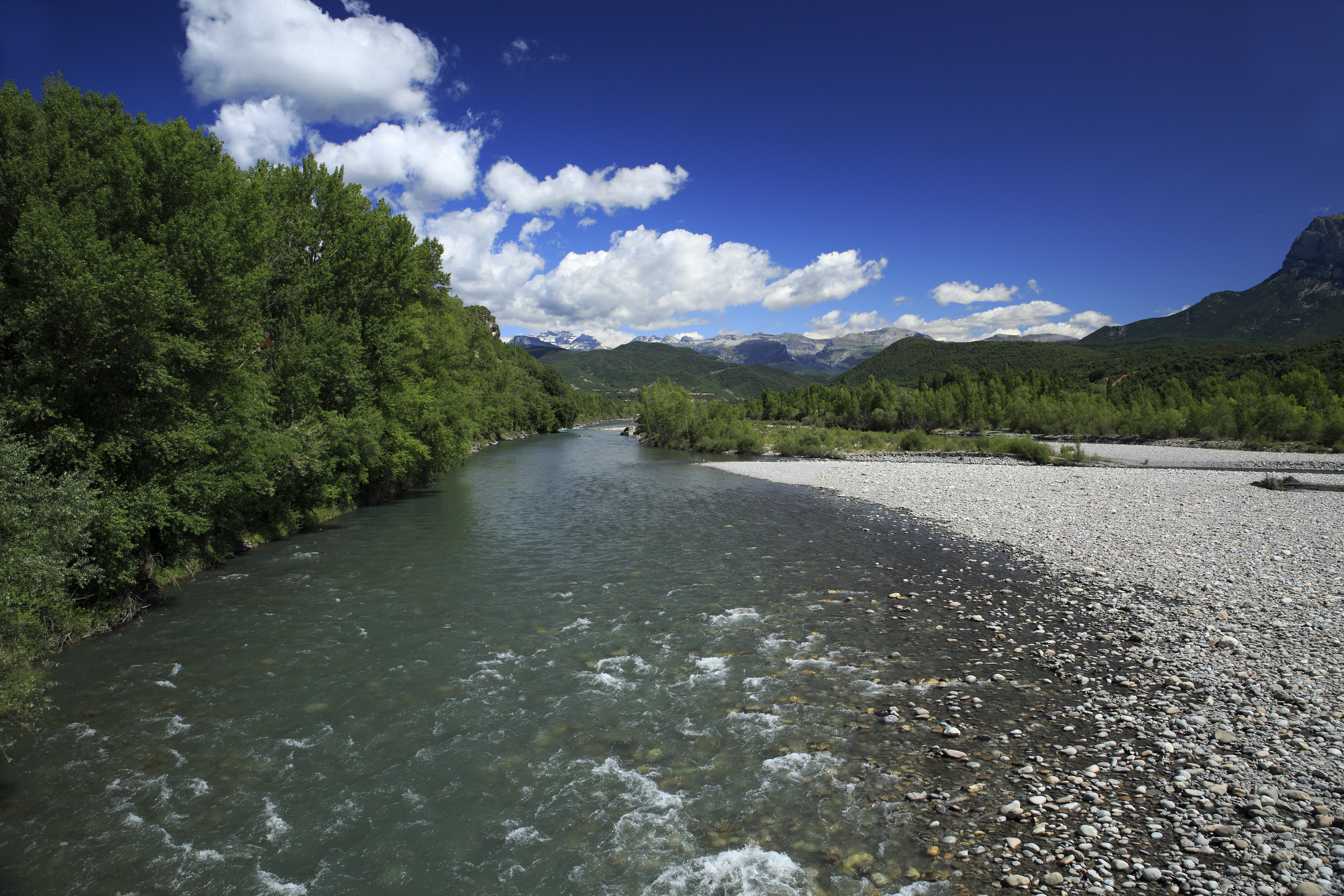 Stromauf Richtung Norden, von der Brücke in Aínsa